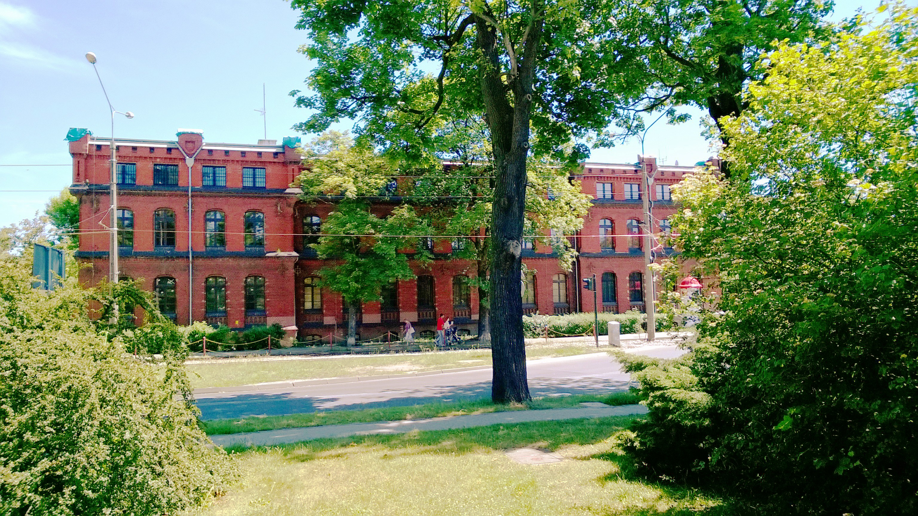 WKU w Toruniu